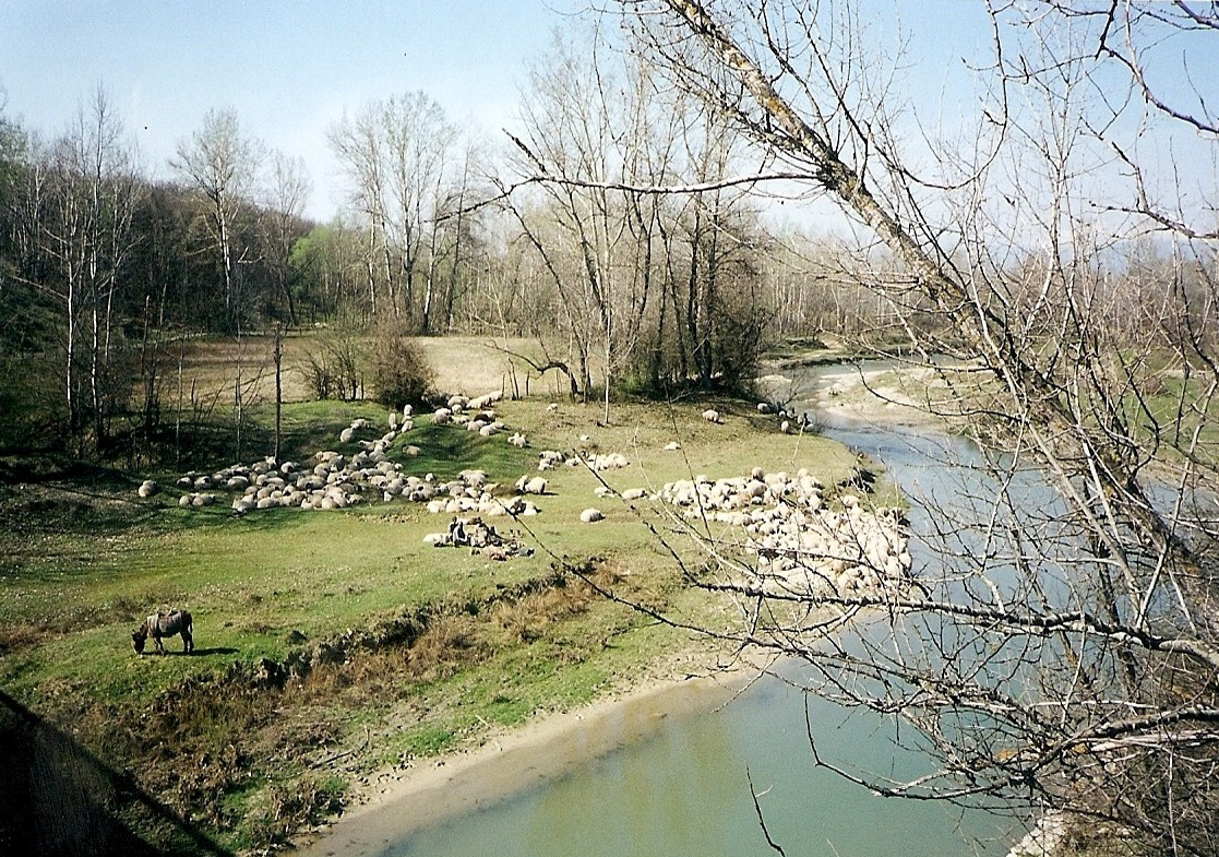 Băile Herculane Județ de Caraș-Severin.- Roumanie.